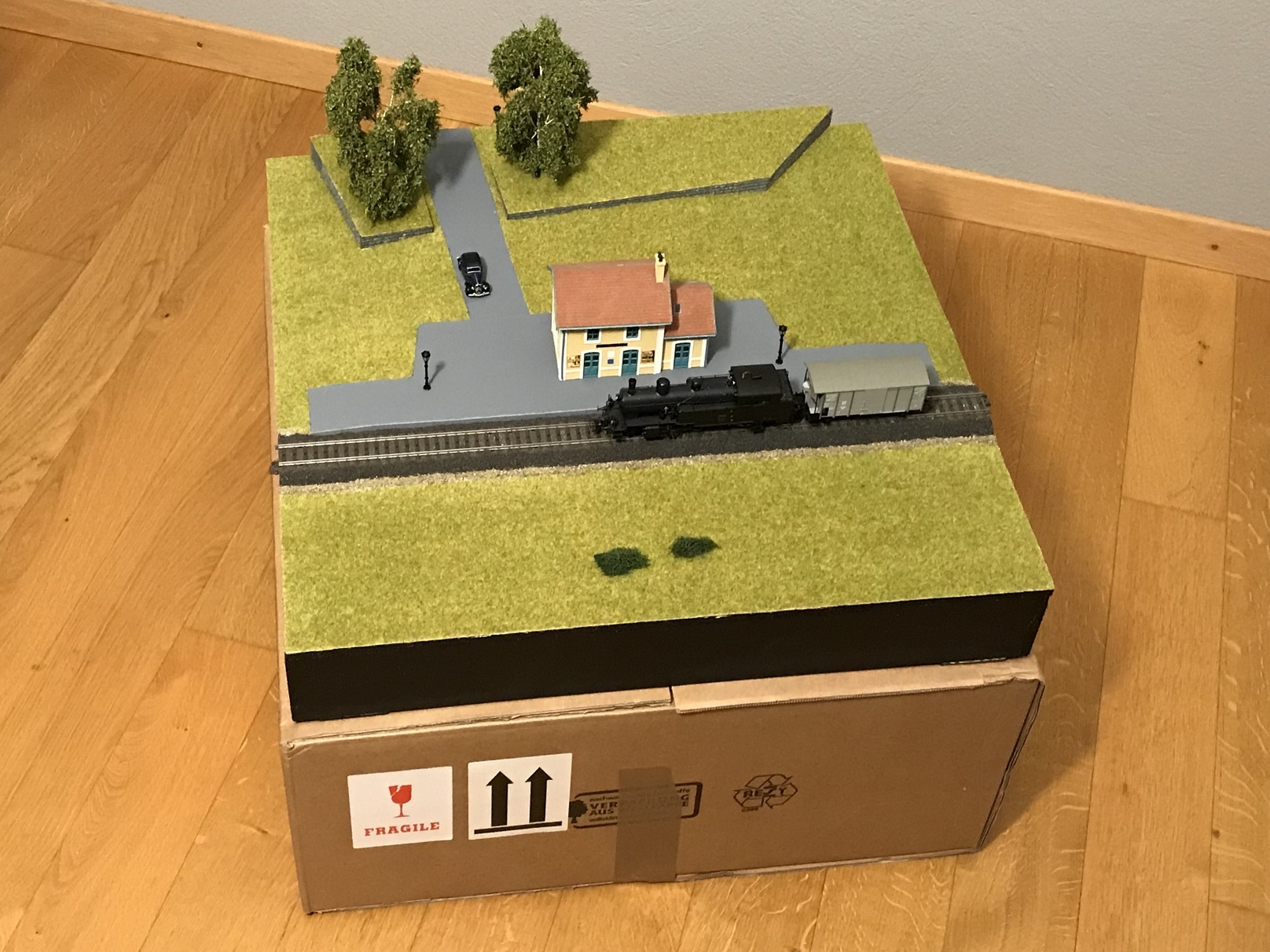 Privates C-Trak Module mit dem Märklin C-Gleis in der Spur H0. Das Modul wiedergibt einen Bahnhof an einer eingleisigen Bahnstrecke im Französisch-Schweizerischen Grenzgebiet. Der Bahnsteig orientiert sich an der Schweiz, der Bahnhof an Frankreich. Folgende verwendete Materialien sind erwähnenswert: Sperrholz Pappel 8 Millimeter dick für den Mudulkasten und die Hintergrundkulisse, C-Geleise von Märklin, Gleisschotter dunkelgrau Artikle 09376 und Grasmatte Sommerwiese Artikel 00280 von NOCH, Schleifpapier mit einer Körnung von 120 für die Strasse. Der Bahnhof nach Französischem Vorbild stammt von MKD, die Parklaternen Artikel 6920 von Vissmann (Nenngrösse TT), die Modellautos von NOREV und Busch, die Figuren von Preiser, die beiden Bäume im Hintergrund stammen von MBR model. Der Bahnhof wie auch die Strasse wurden mit Acrylfarbe angestrichen. Die Schienenfahrzeuge stammen aus dem Hause Märklin und Bachmann. Eine Trix SBB Eb 3/5 und ein Liliput SBB K2. Das Modul hat eine um 2 cm geringere Bauhöhe als die Bauhöhe nach den Richtlinien der Internetseite C-Trak Das andere Modulsystem. Unterhalb des Moduls eine handelsübliche Kartonschachtel mit den Innenmassen von 550 x 550 Millimeter als Lager- und Transportverpackung.